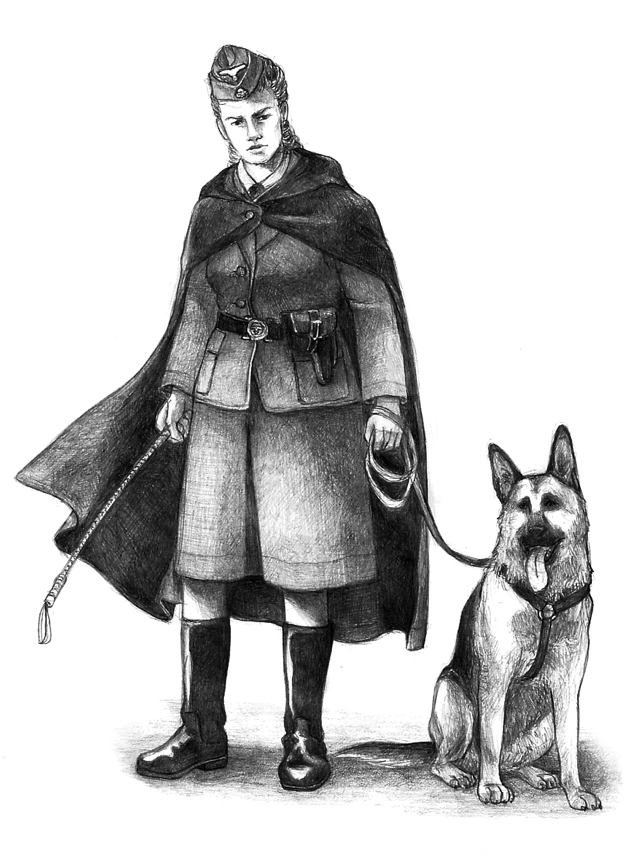 SS-Aufseherin: Female Camp Guards [kobieca służba nadzorcza w obozach koncentracyjnych 1938-1945]